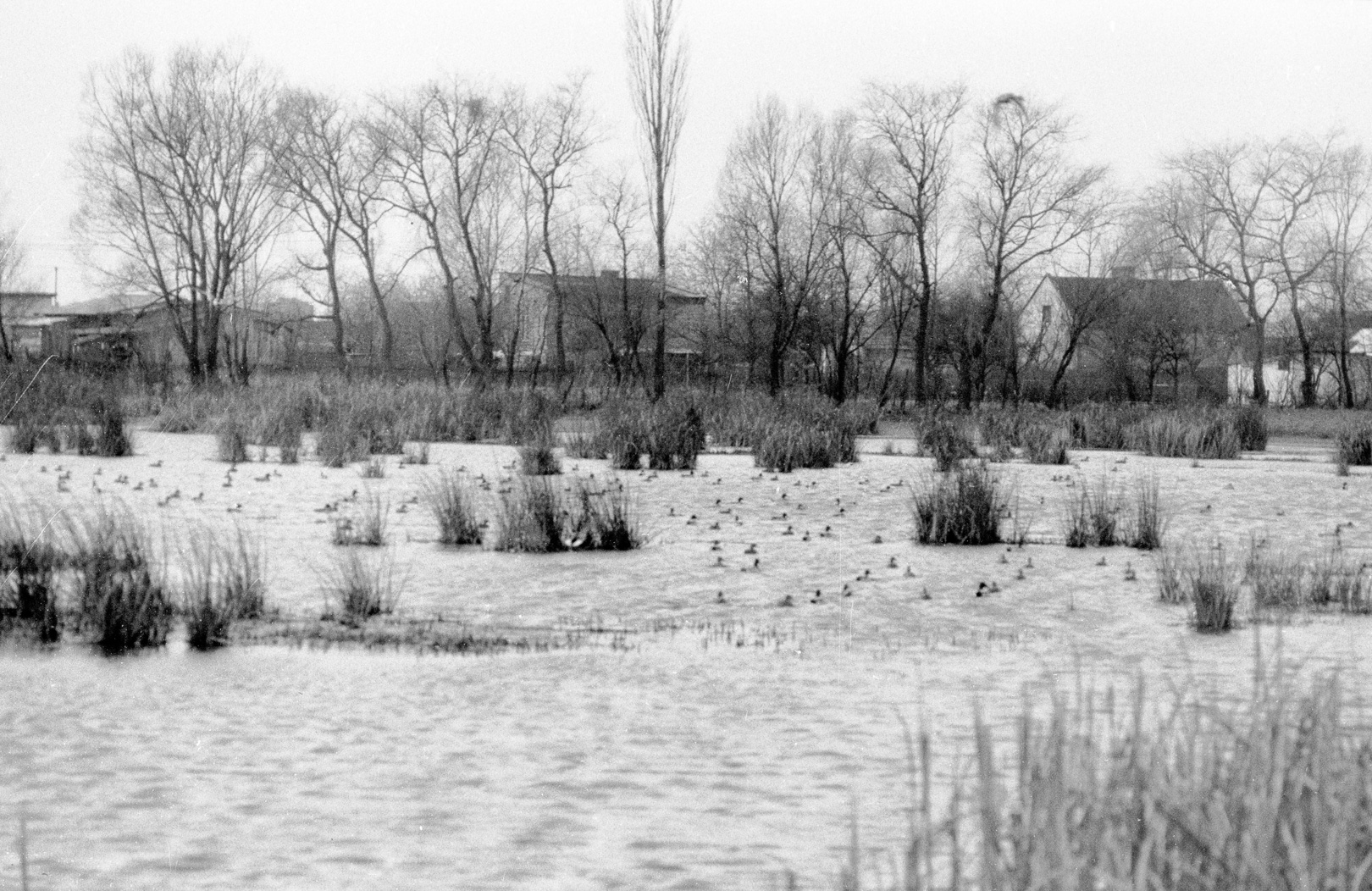 Jeziorko Zgorzała, część północna, fragment, w kierunku zachodnim (rogu ul.Trombity i Kórnickiej)